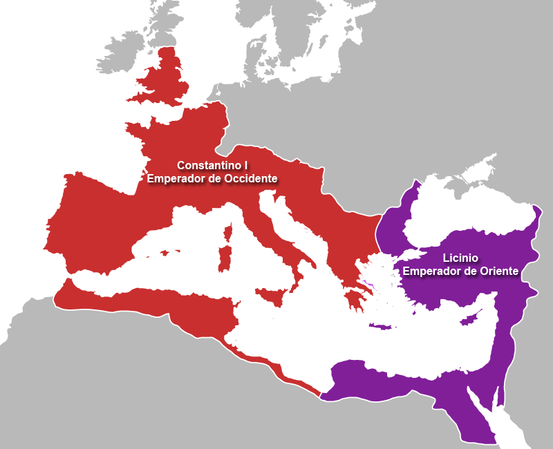 Imperio romano en 317, después de la primera guerra entre Constantino I y Licinio.